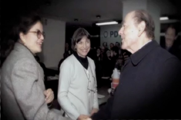 Biografia